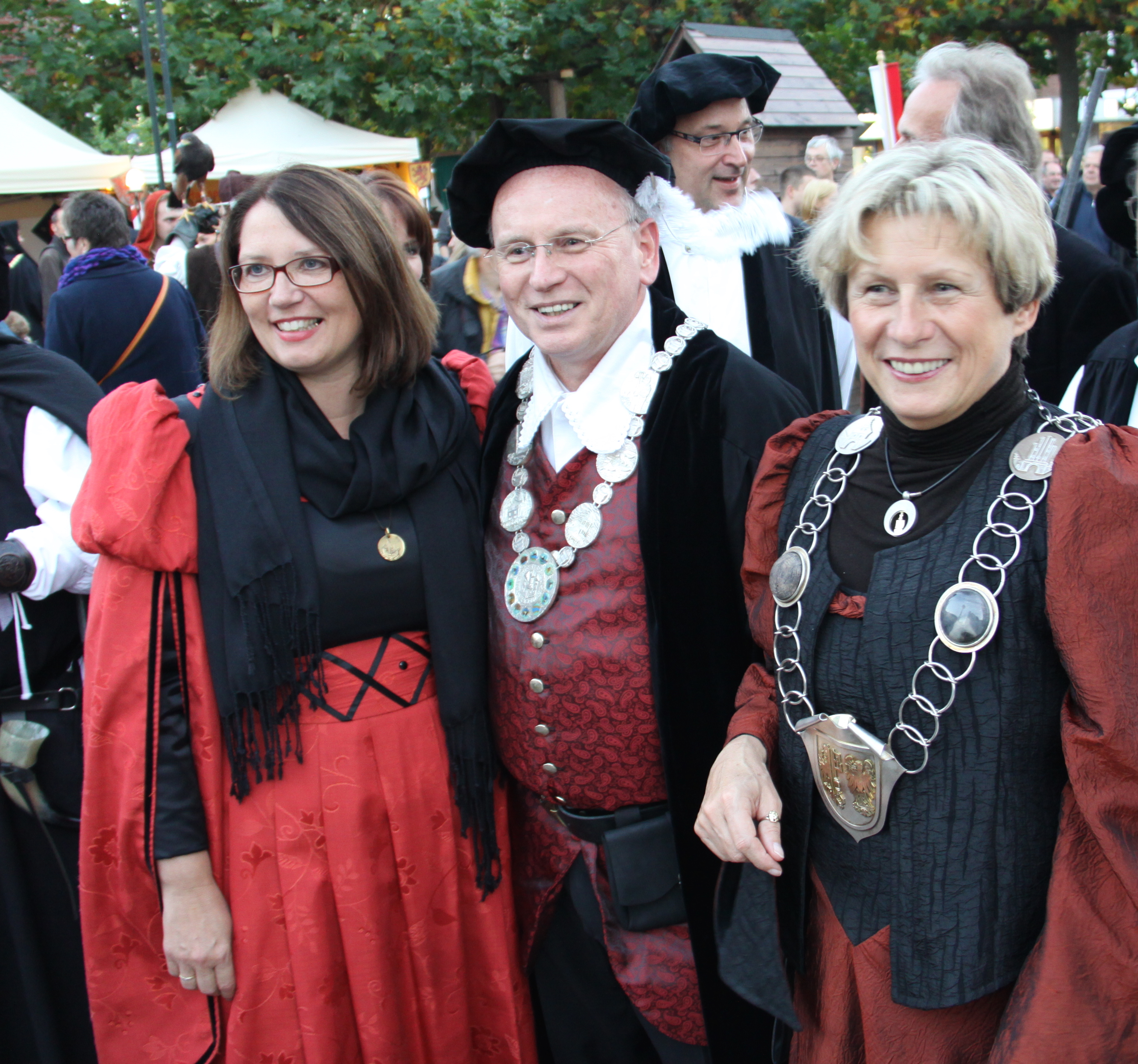 Sabine Danicke mit der Bürgermeisterin der Hansestadt Wesel, einer Partnerstadt der Hansestadt Salzwedel 2013